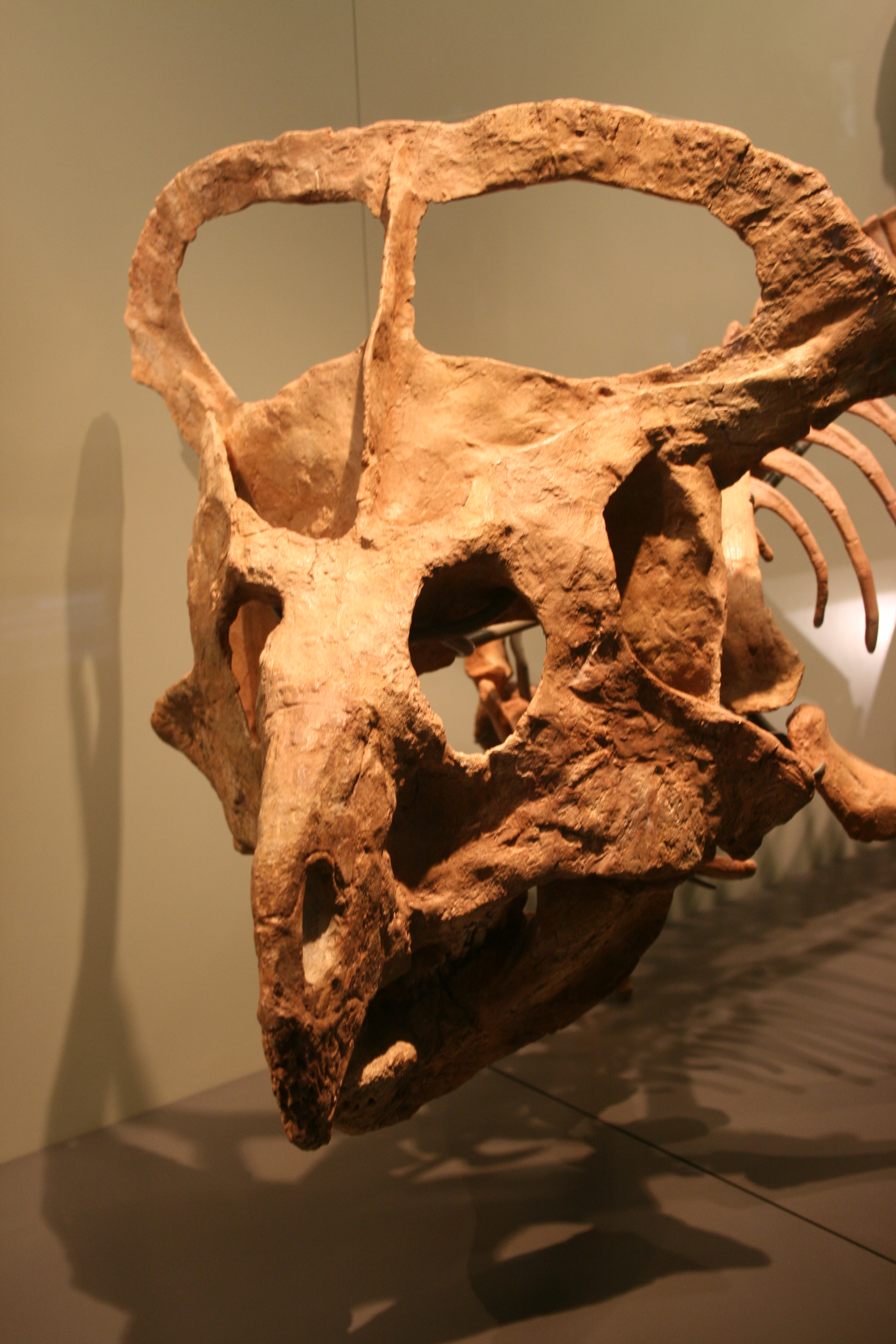 Schädel eines Protoceratops andrewsi